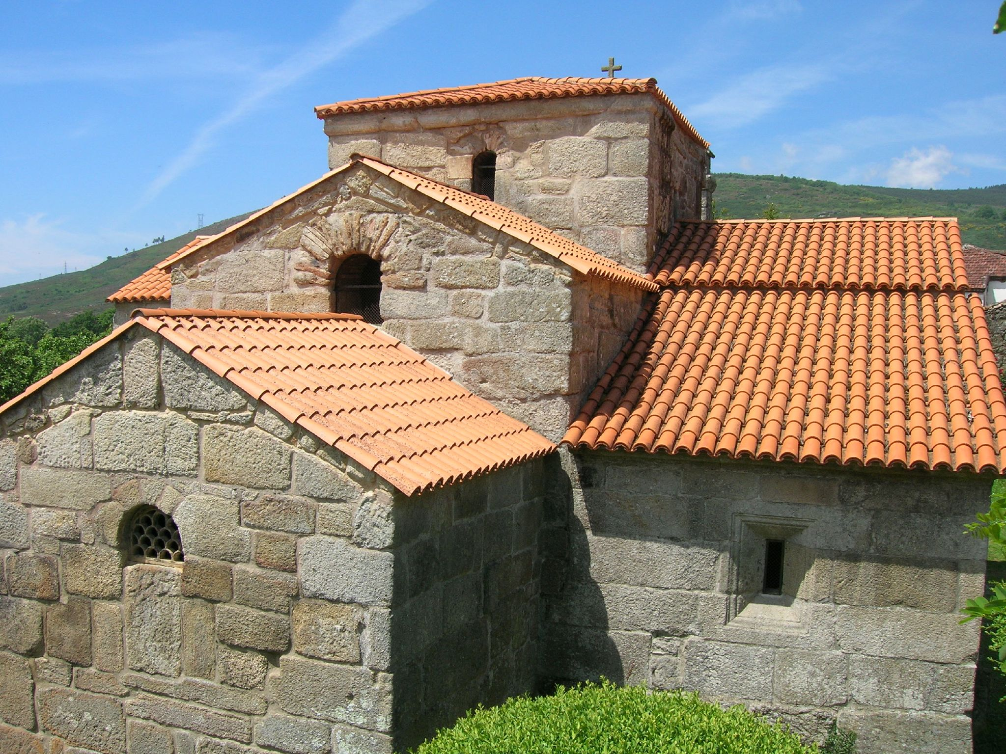 gl: Igrexa de Santa Comba de Bande